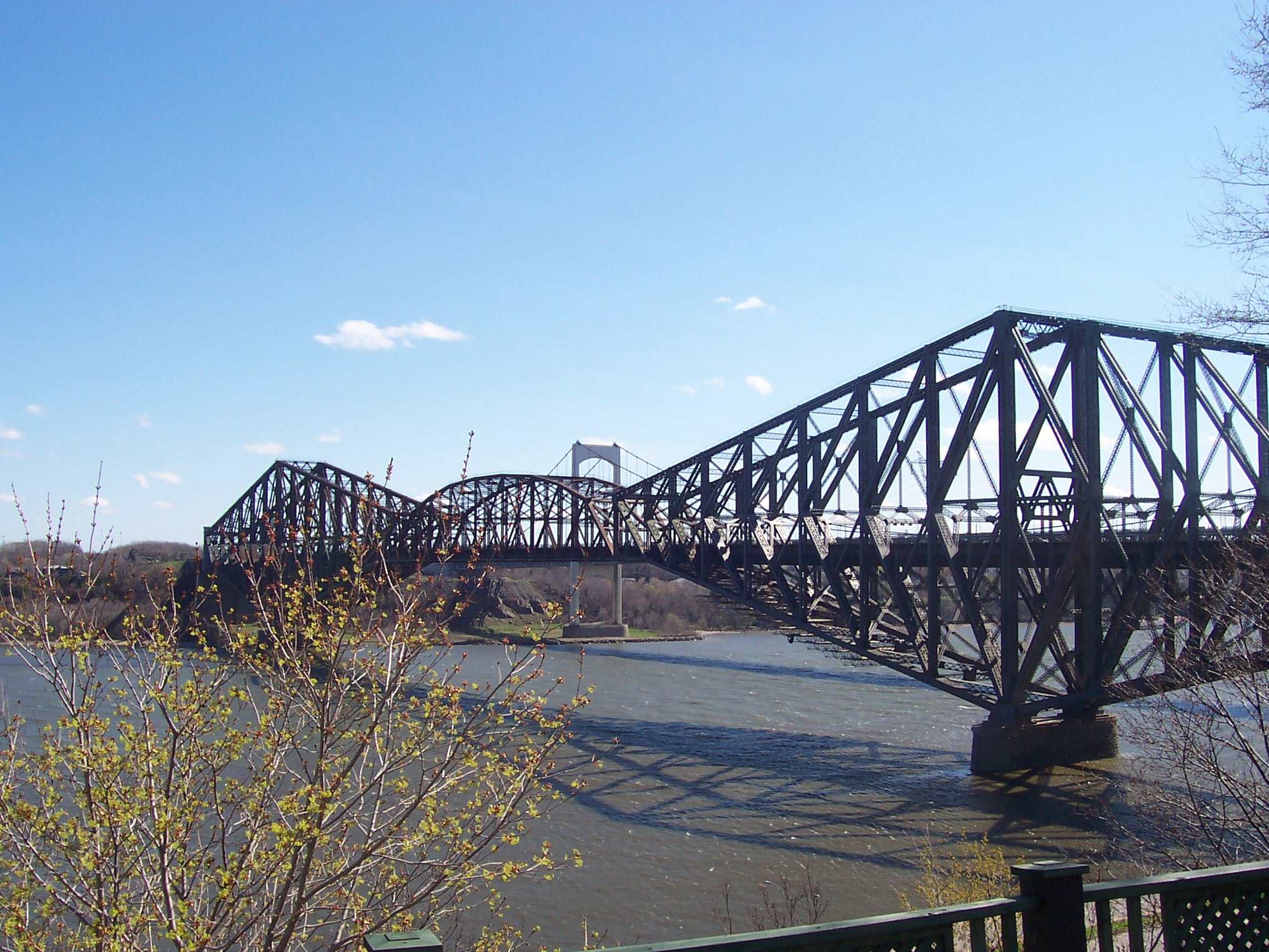 Pont de Québec vu du Parc aquarium du Québec (ville de Québec, Québec, Canada); A view of the Quebec Bridge from the Parc Aquarium du Québec (Quebec city, Quebec, Canada)